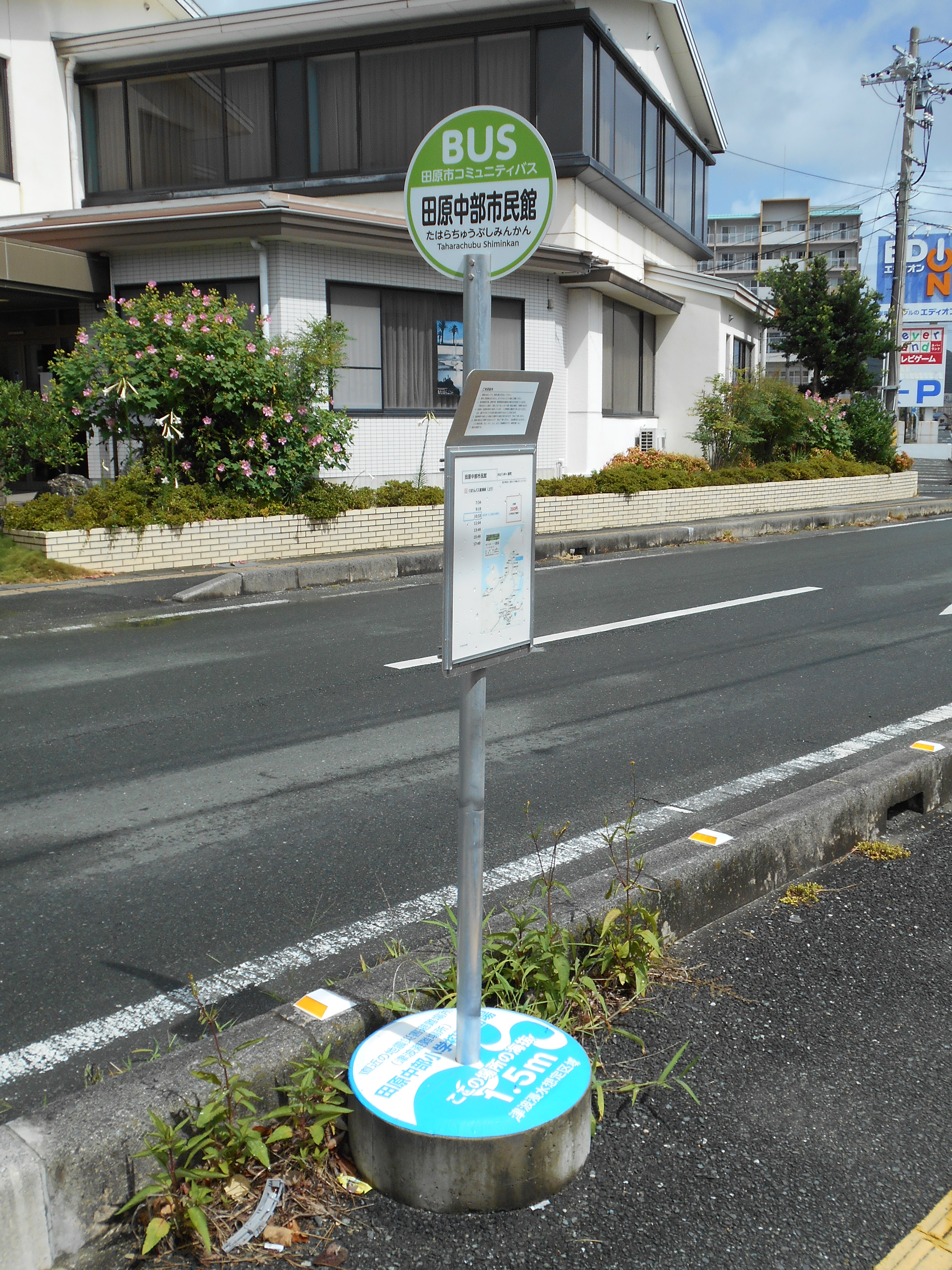 田原市ぐるりんバス市街地線「田原中部市民館」バス停の画像（標識全体、2019年8月）。